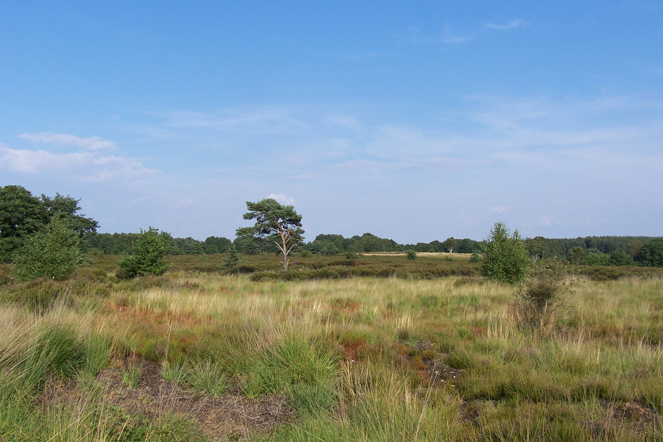 Typisch Kempens landschap op de Mechelse Hei (Maasmechelen).